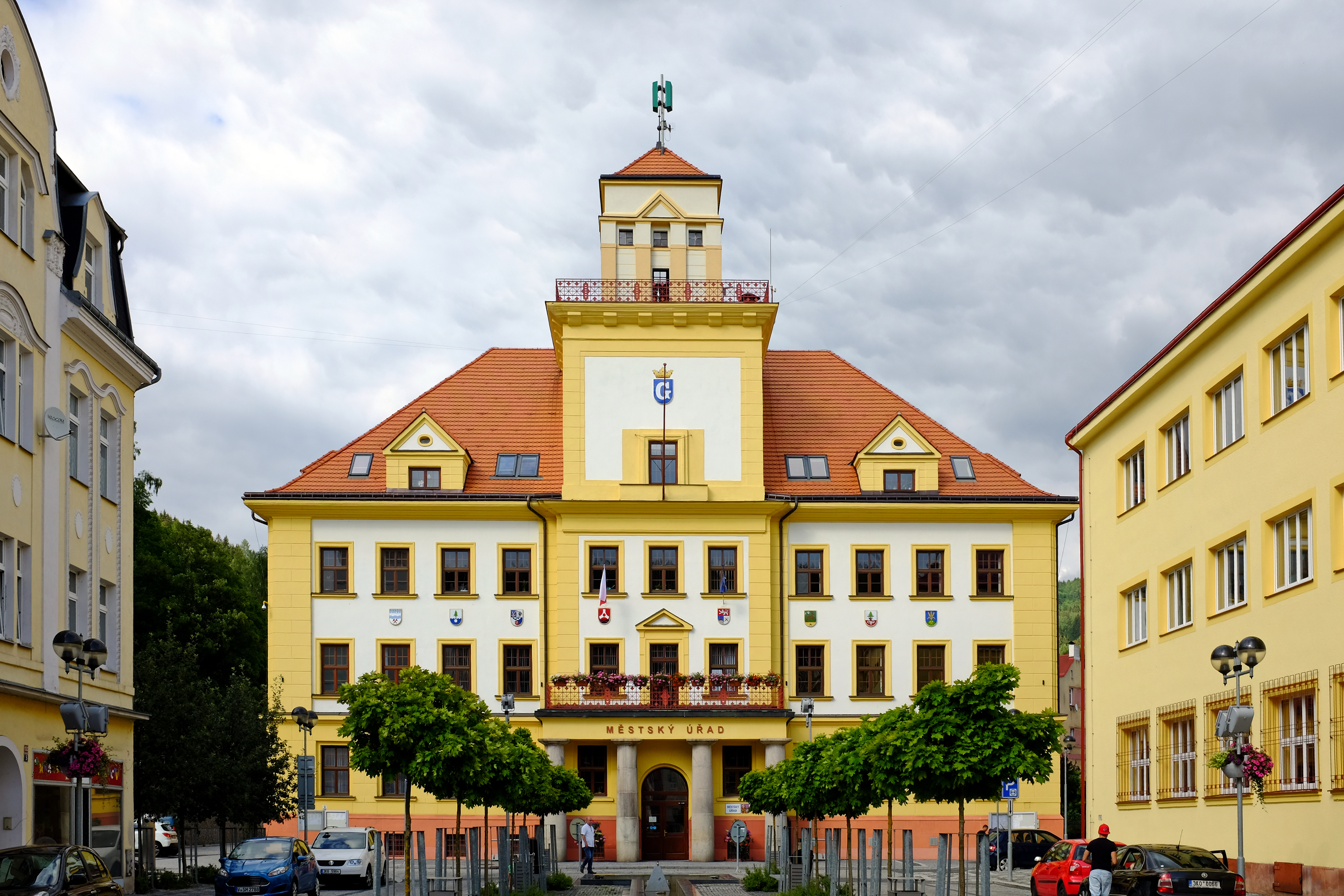 Kraslice, radnice